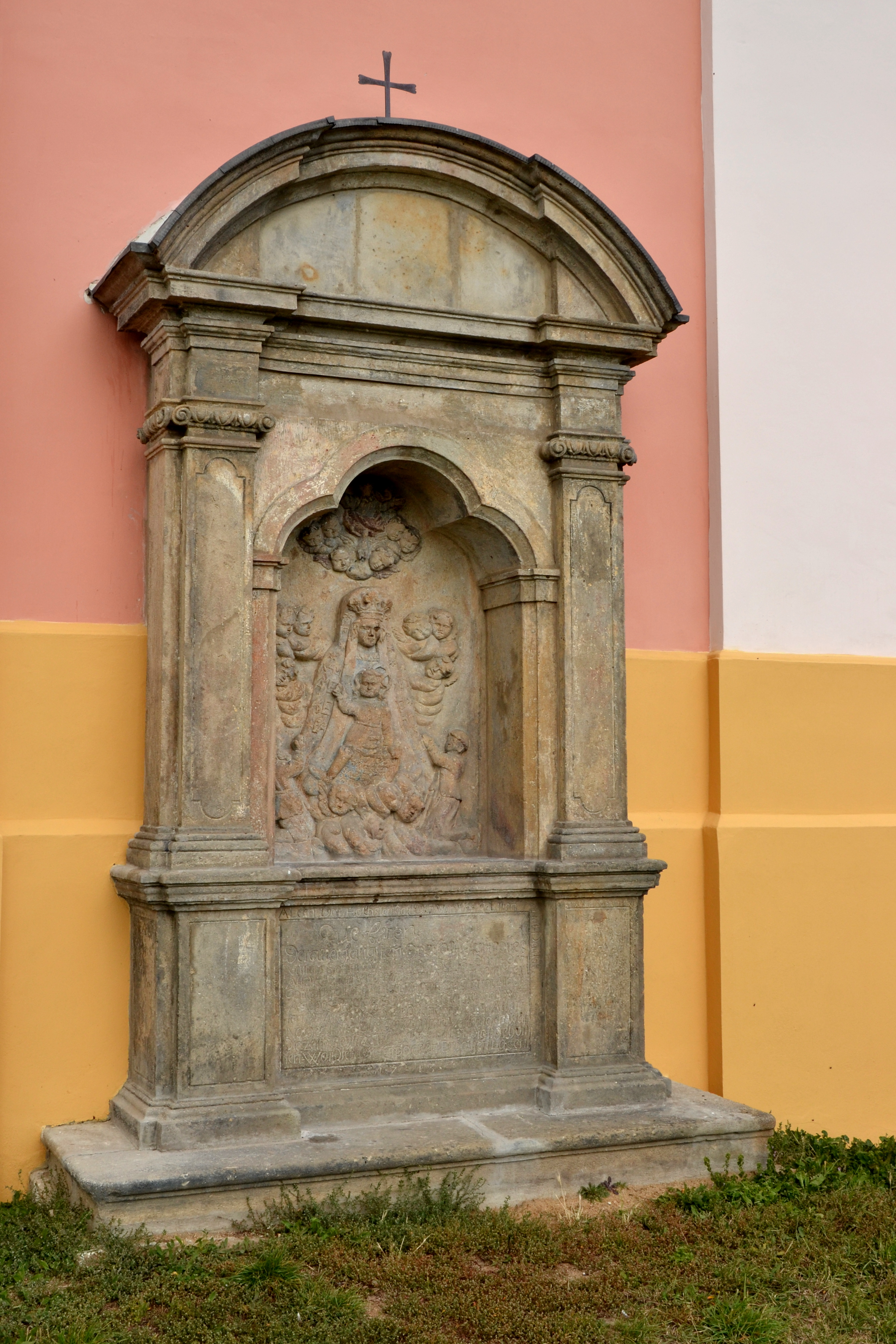 Výklenková kaplička Panny Marie (Březno), u kostela sv. Petra a Pavla, Březno